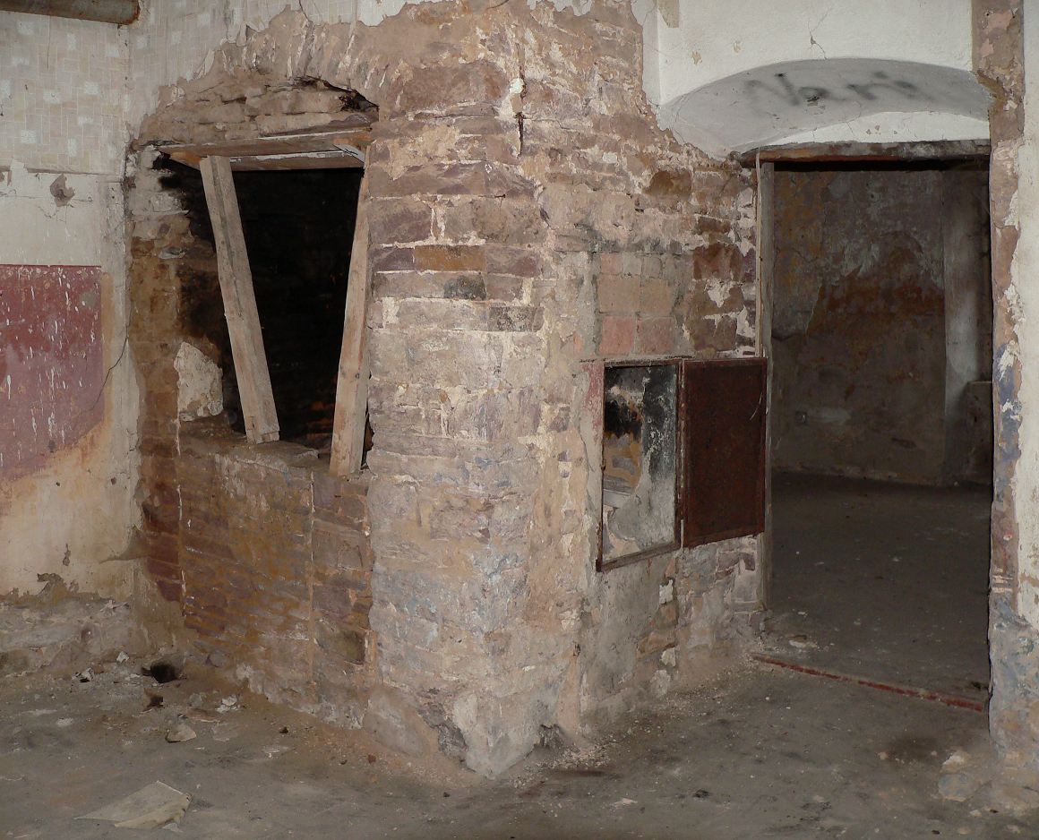 Die Alte Mühle oder Windmühle, früheres Gebäude der Porzellanmanufaktur Fürstenberg im Inneren, mächtiger zentraler Schornsteinkamin im Erdgeschoss